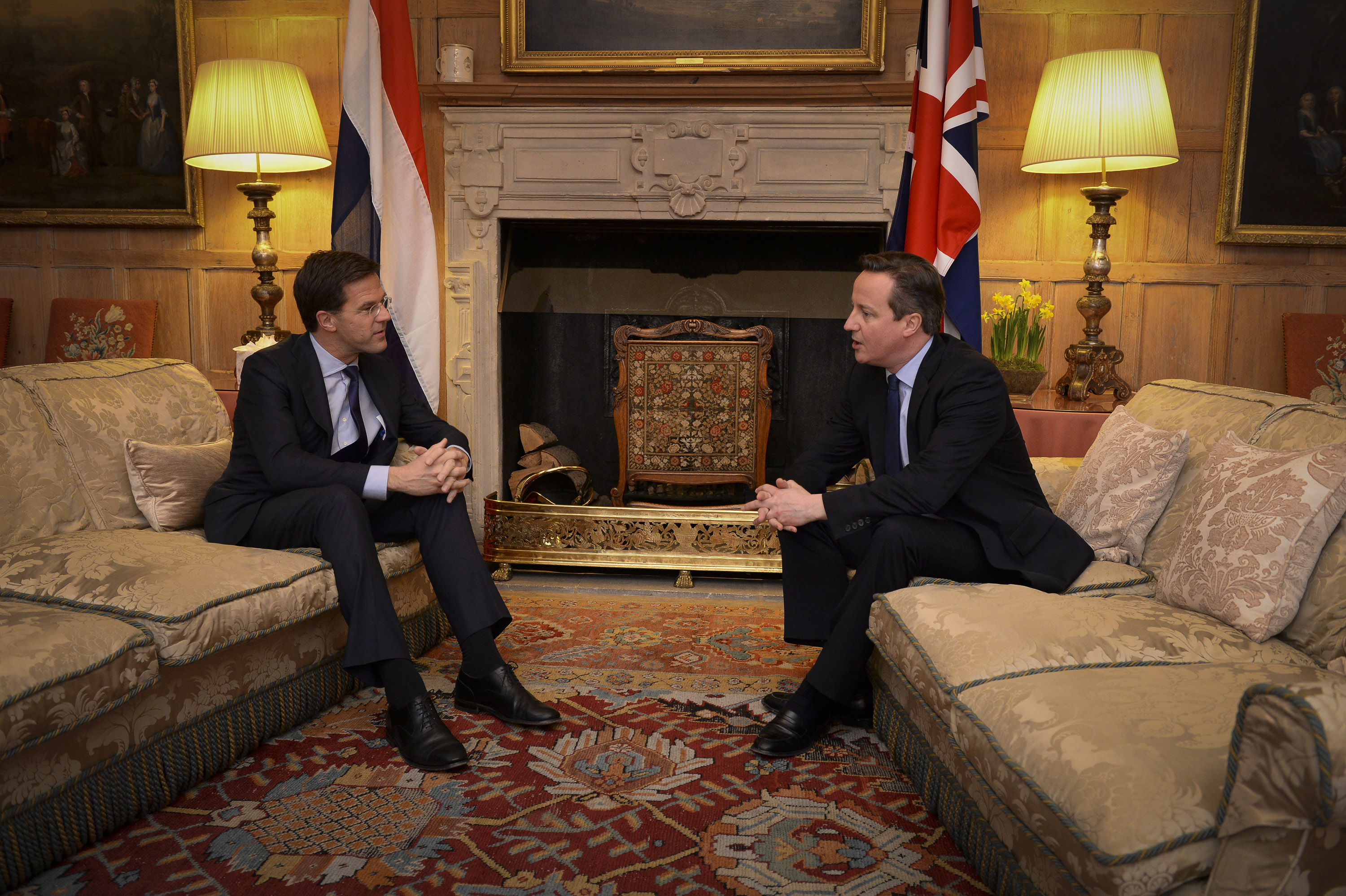 Minister-president Rutte heeft vanavond gesproken met zijn Britse collega Cameron op diens buitenverblijf Chequers. Op de agenda stonden actuele Europese dossiers, zoals de versterking van de interne markt en het Europese klimaat-, energie- en industriebeleid. Daarnaast is vooruitgeblikt op de Europese Verkiezingen van eind mei en de instelling van de nieuwe Europese Commissie. Het Nederlandse kabinet maakt zich er sterk voor dat de nieuwe Europese Commissie duidelijke prioriteiten stelt volgens het motto ‘Europees wat moet, nationaal wat kan’. Door zich te richten op de kerntaken kan Europa beter functioneren ten behoeve van groei, banen en stabiliteit.